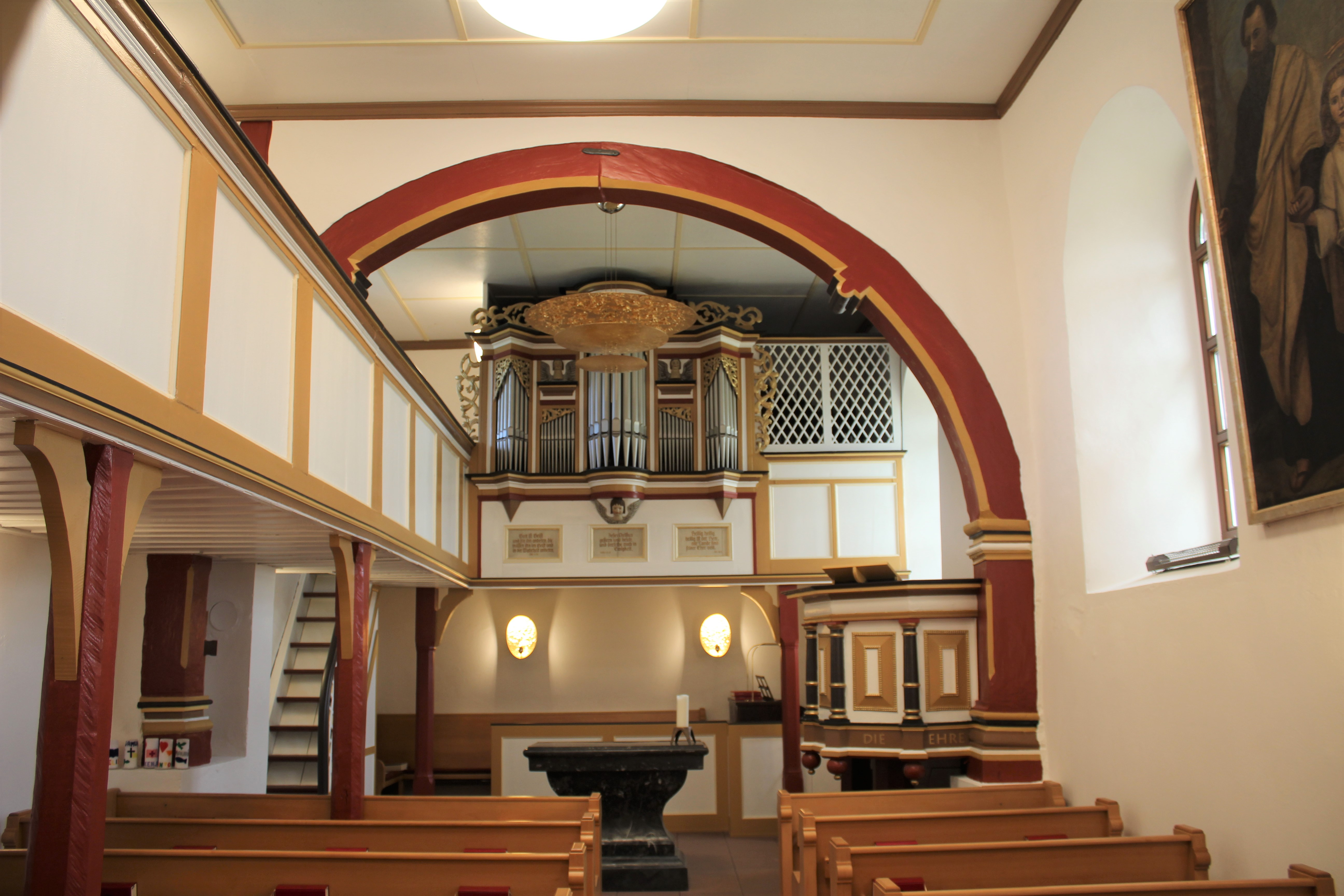 Evangelische Kirche Oberwetz, Gemeinde Schöffengrund, Hessen, Deutschland